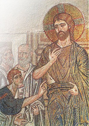 Уверение апостола Фомы